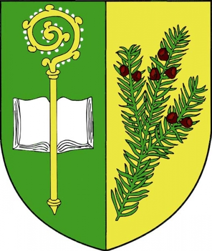 znak, Tisová, okres Ústí nad Orlicí